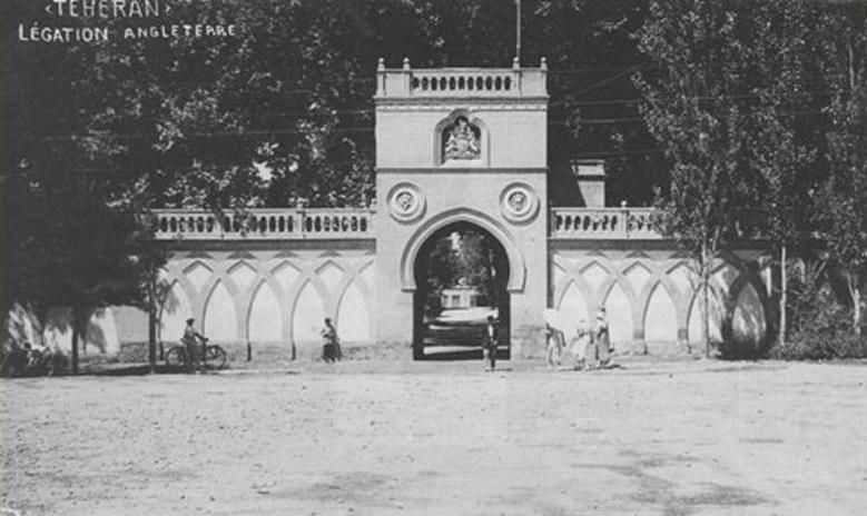 سفارت انگلستان، خیابان علاءالدوله، اواخر دوران قاجار - کارت پستال